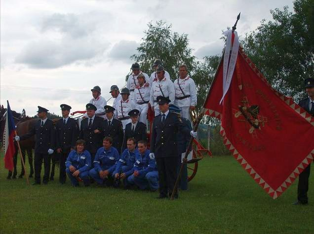 spolecna fotka sboru z oslav vyroci 130 let zalozeni SDH Kamberk